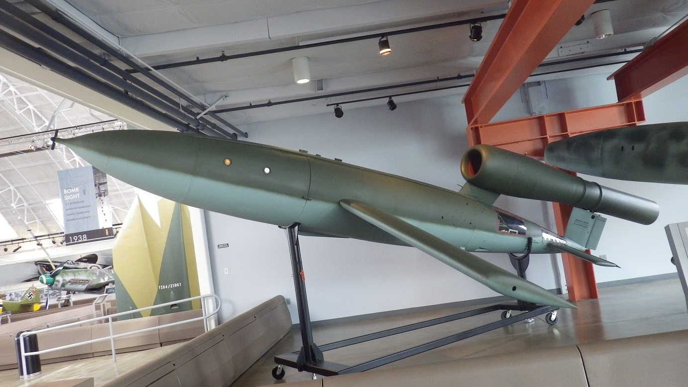 Fieseler Fi 103 V-1 Flying Heritage Collection